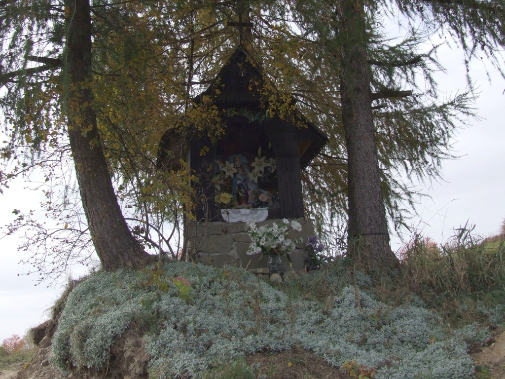 Kapliczka na osiedlu Zarębek Wyżni Łopusznej (Gorce)